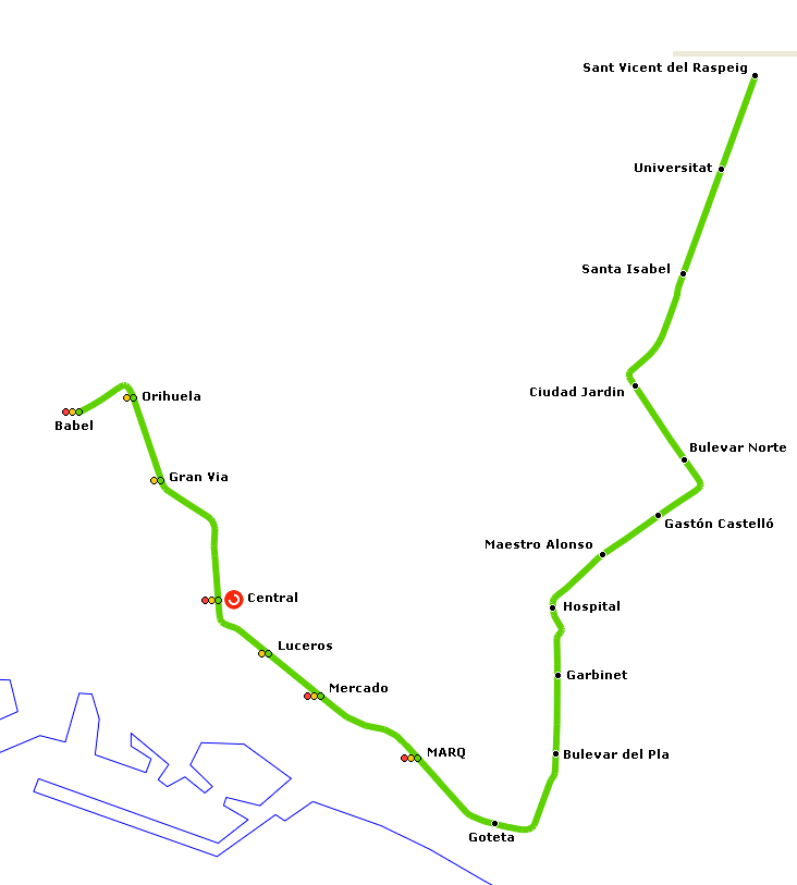 Linea 2 del TRAM